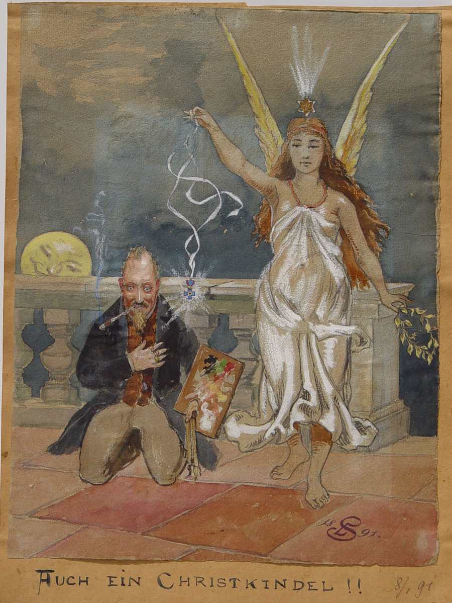 Ludwig Scheuermann: Auch ein Christkindelǃǃ (Dargestellt ist der Maler Otto Seitz, der von einem sehr erwachsenen 'Christkind' das Bayerische Verdienstkreuz bekommt). Aquarell auf Malpapier, ca.30 x 23 cm, datiert '1891'. Blatt aus dem Album/Gästebuch (aus den Jahren 1886-1898) der Münchner Mittwochsgesellschaft, die der Verleger Hugo Bruckmann (1863-1941) im Zentral-Café Ungerer, Dachauer Str. 9 gegründet hatte. Unter den Mitgliedern waren neben Ludwig Scheuermann und Hugo Bruckmann der Verleger Edgar Hanfstaengl (1842-1910), die Maler August Leonhardi (1867-1931), Anton Mangold (1863-1907) und Moritz Röbbecke (1857-1916), Winfried von Miller (1854-1925) und Otto Seitz (1846-1912)